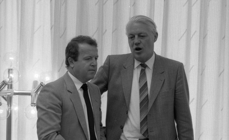 Ministerpräsidenten-Konferenz im Haus der Landesvertretung Rheinland-Pfalz.